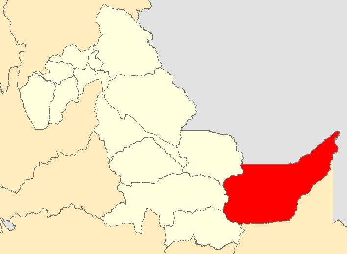 Mapa distrito Purus,Ucayali - Perú